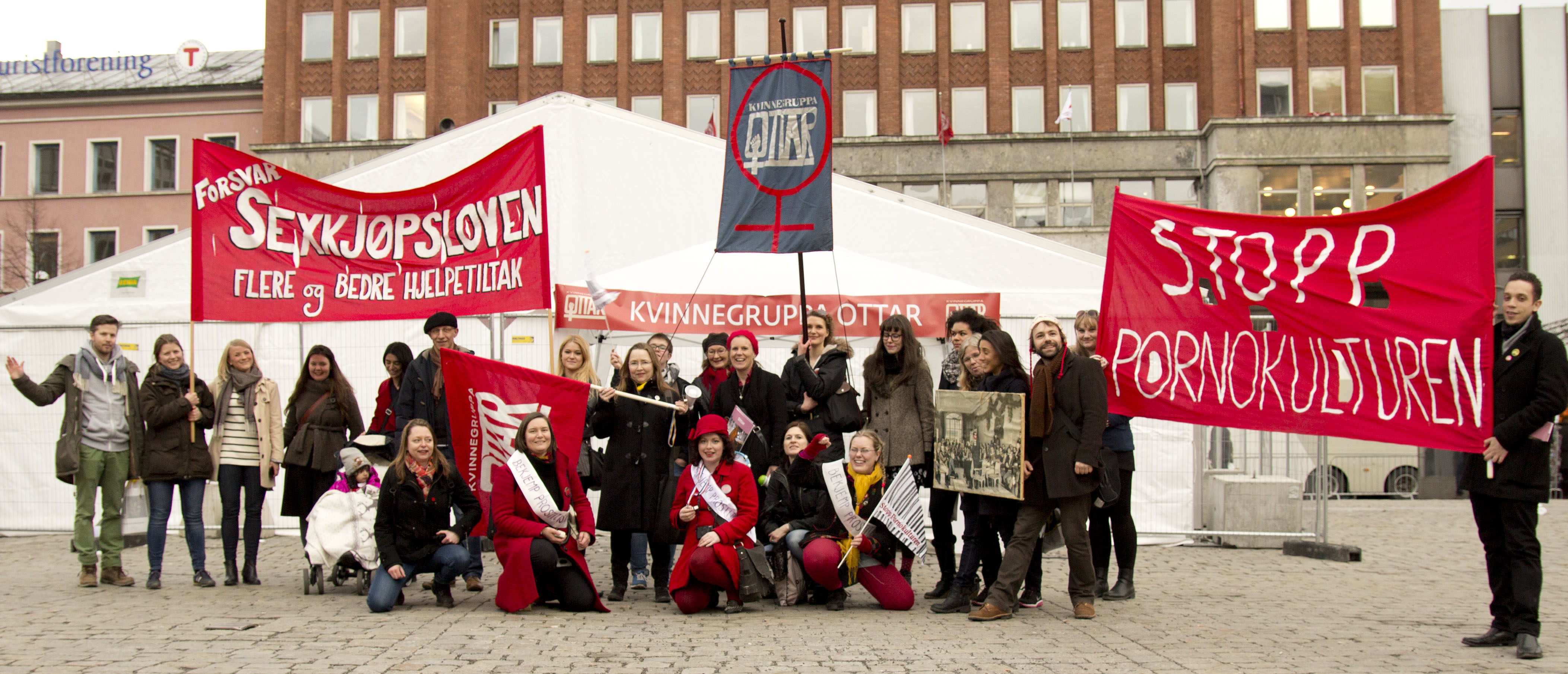 Bilde av medlemmer av Kvinnegruppa Ottar i Oslo, 8. mars 2014